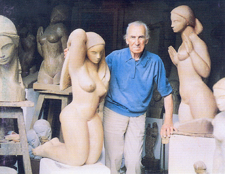 Le sculpteur Jean-Jacques KRAFFT dans son atelier, rue Coriolis dans le 12ème arrondissement à Paris, en 1993